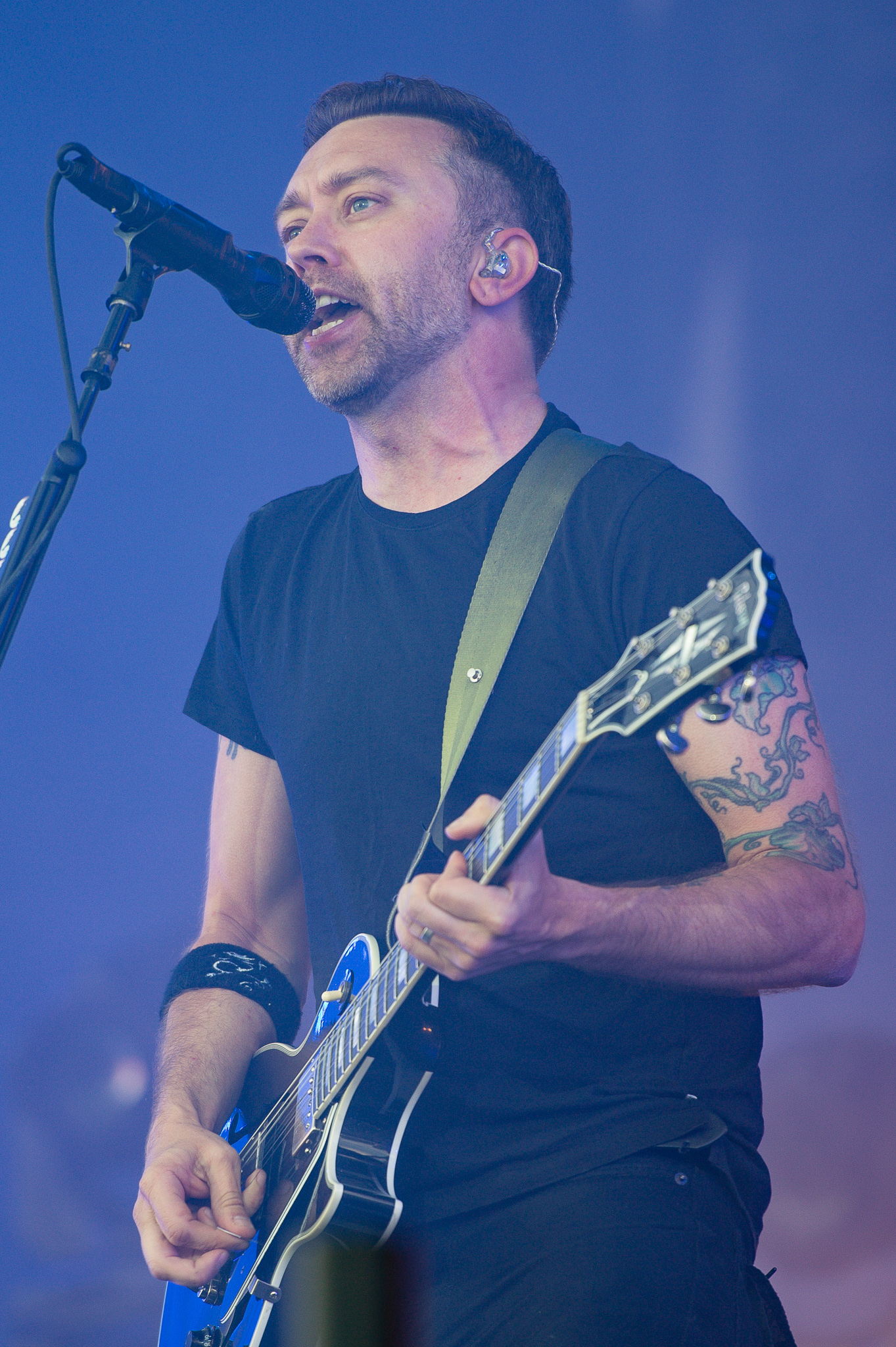 ARGO-Konzerte,Festival,Konzert,Livekonzert,Livemusik,Musik,RiP,Rise Against,Rock im Park 2018,Tim McIlrath,Zeppelin Stage